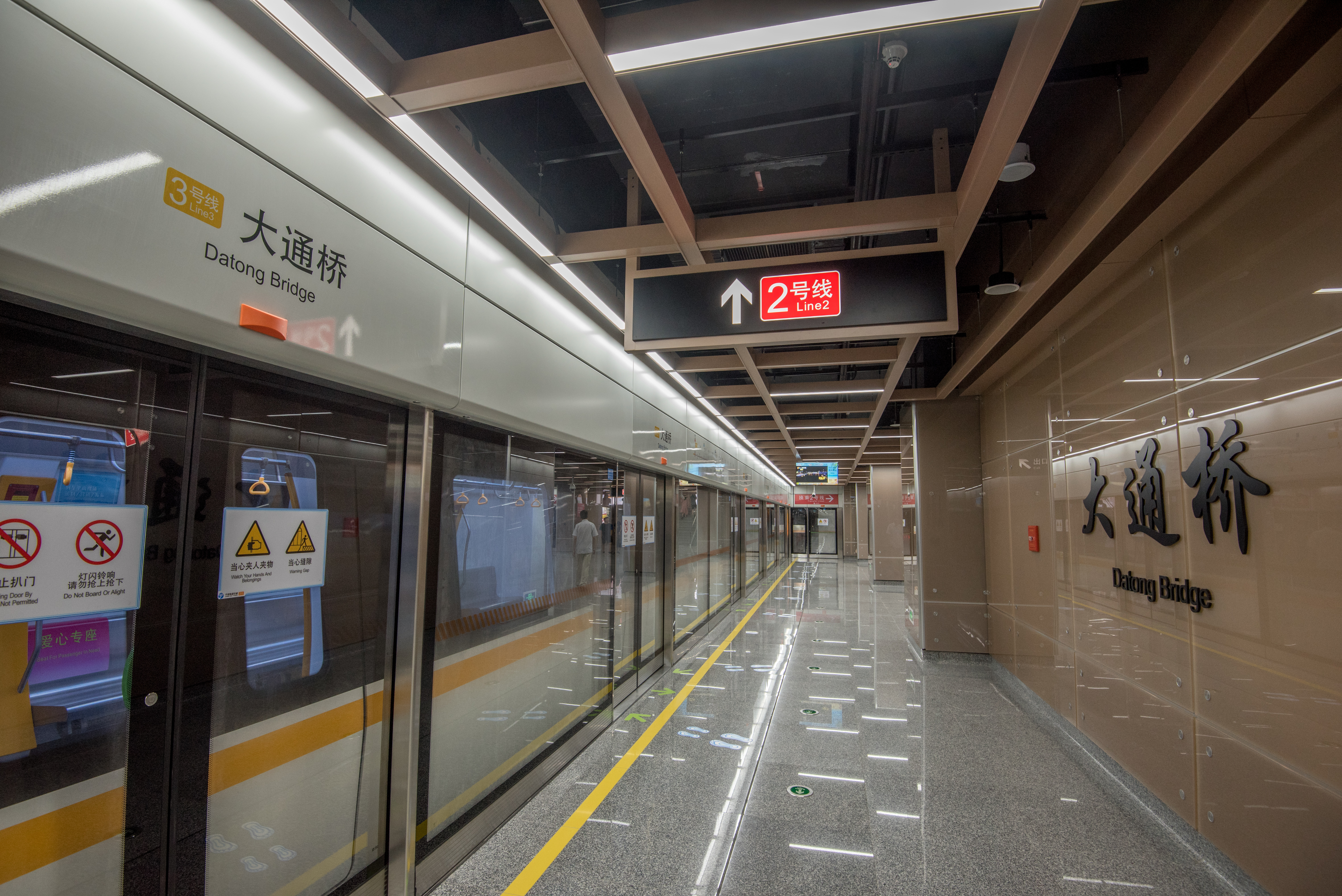 宁波地铁大通桥站